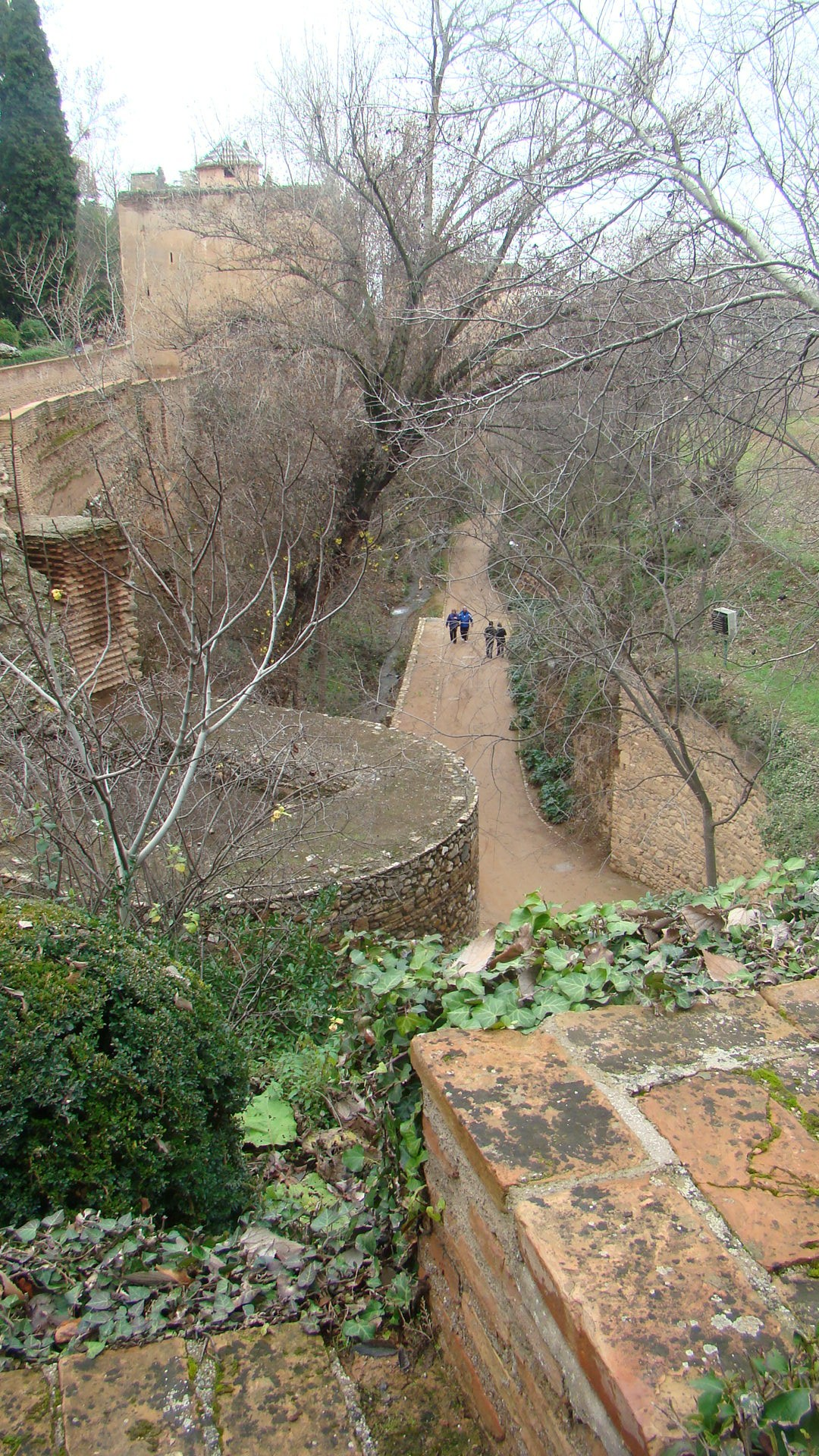 Vista de la cuesta de los Chinos y del bastión de la Torre del Cabo de la Carrera, en la Alhambra